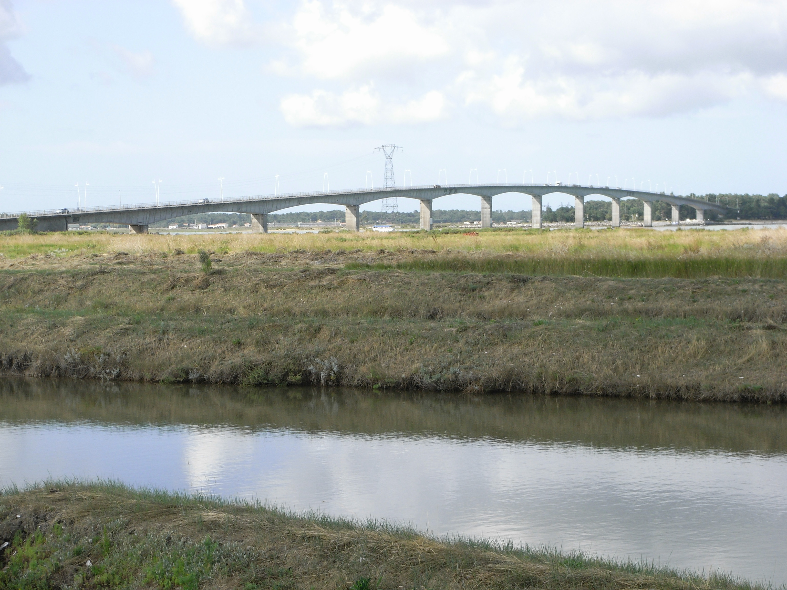 Viaduc de la Seudre situé sur l'estuaire de la Seudre en Charente-Maritime (France)